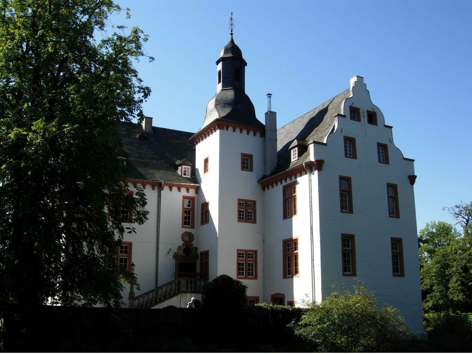 Burg Metternich am Swistbach, Metternich (Weilerswist)